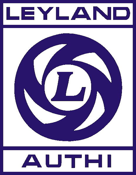 Firmenlogo Automobilhersteller Leyland Authi in Pamplona